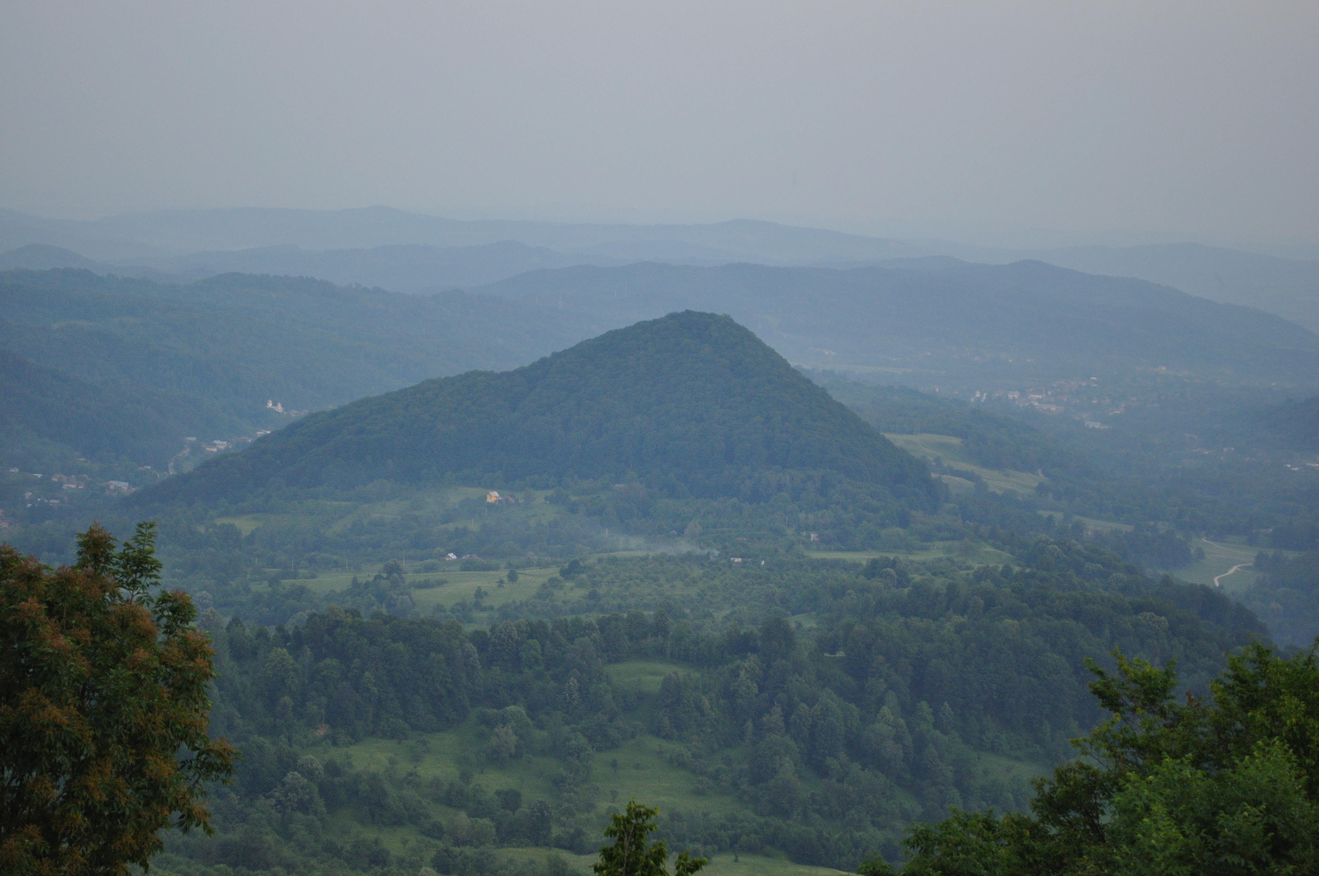 Muntele Stogu și împrejurimile